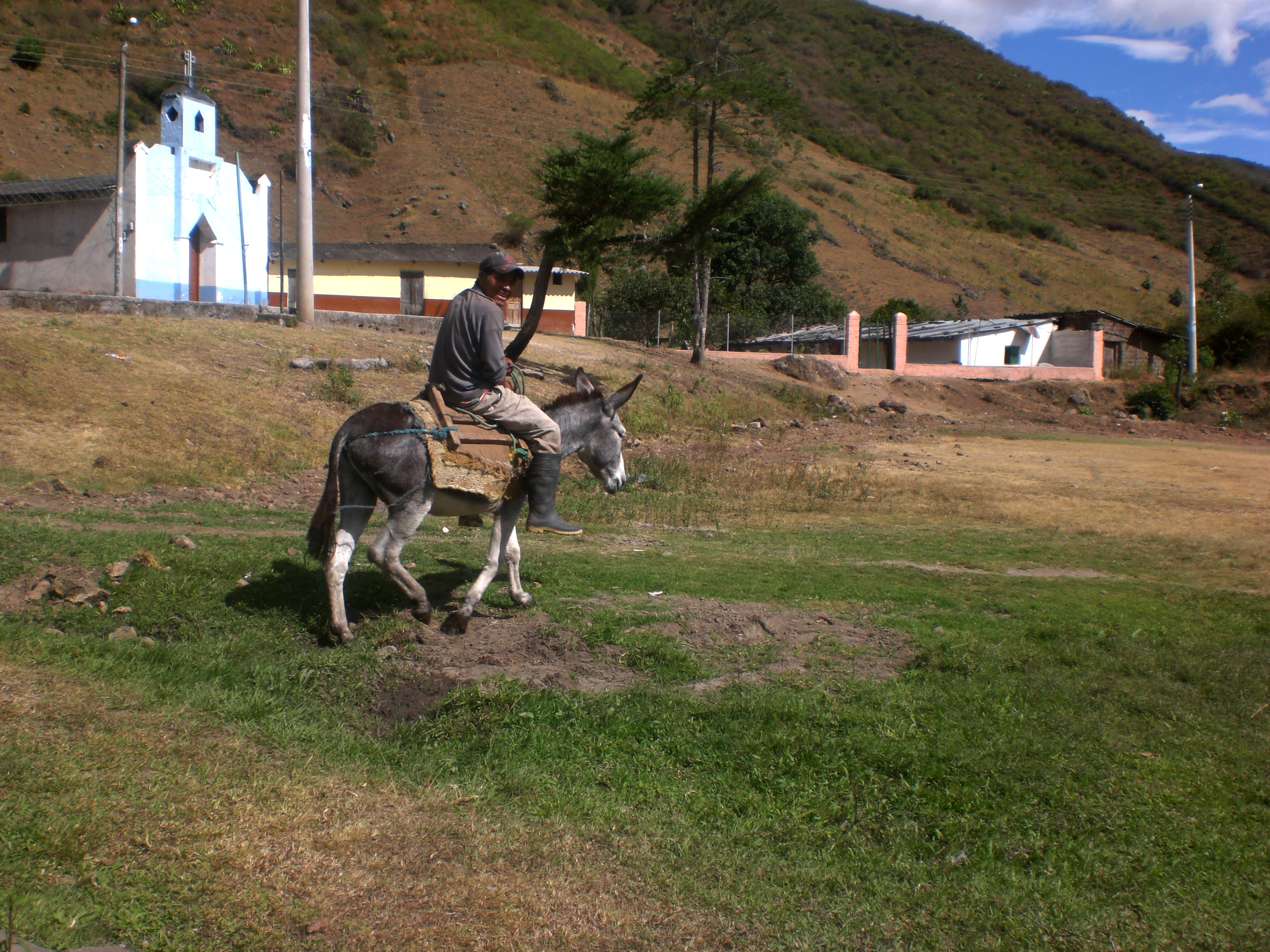 Foto de Mauro en la Plaza del Milagro